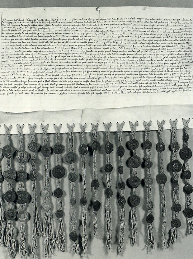 Kölner Urkunde, Verfassungsartikel aus dem ersten Findbuch. Die Urkunde von 1321 legte die Vereinbarungen des "engen" und "weiten" Rates fest.